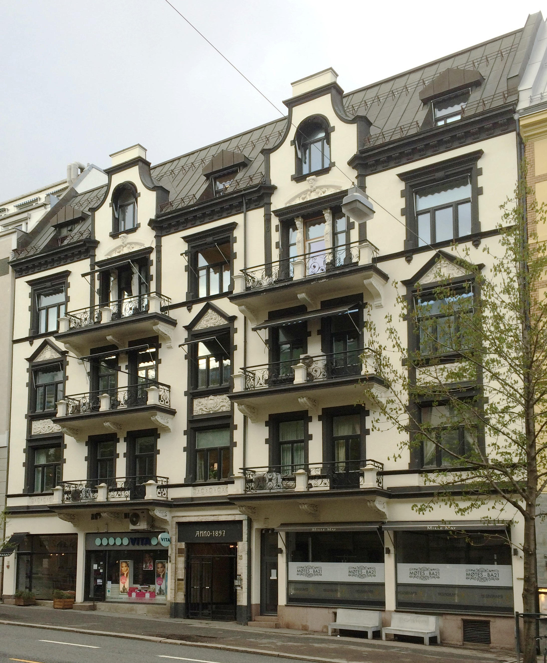 Bygdøy allé 21. Arkitekt: Carl Michalsen (1897).